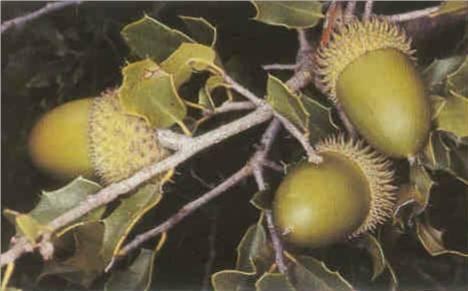 Mini Carvalhos.